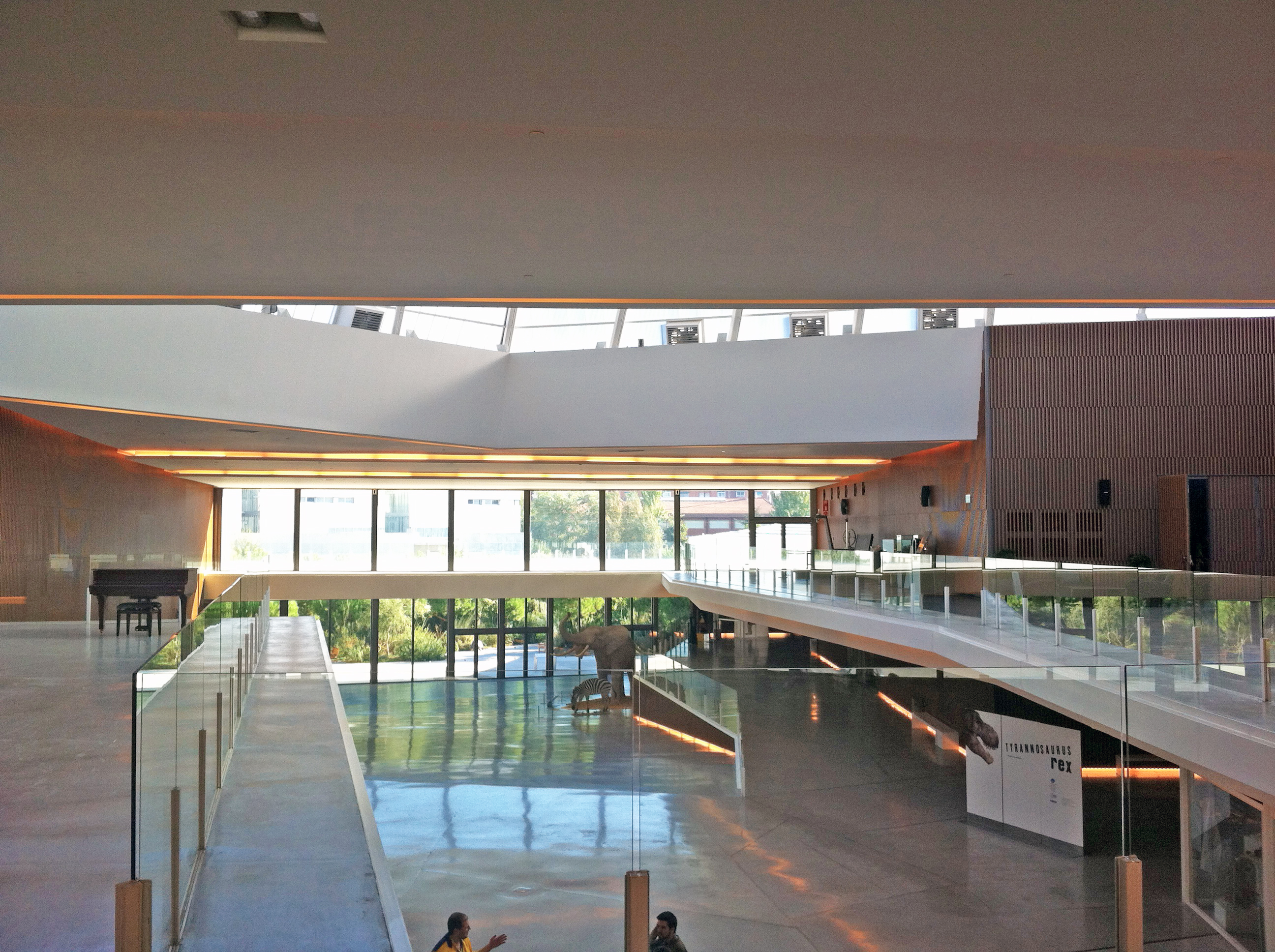 Parque de las Ciencias de Granada